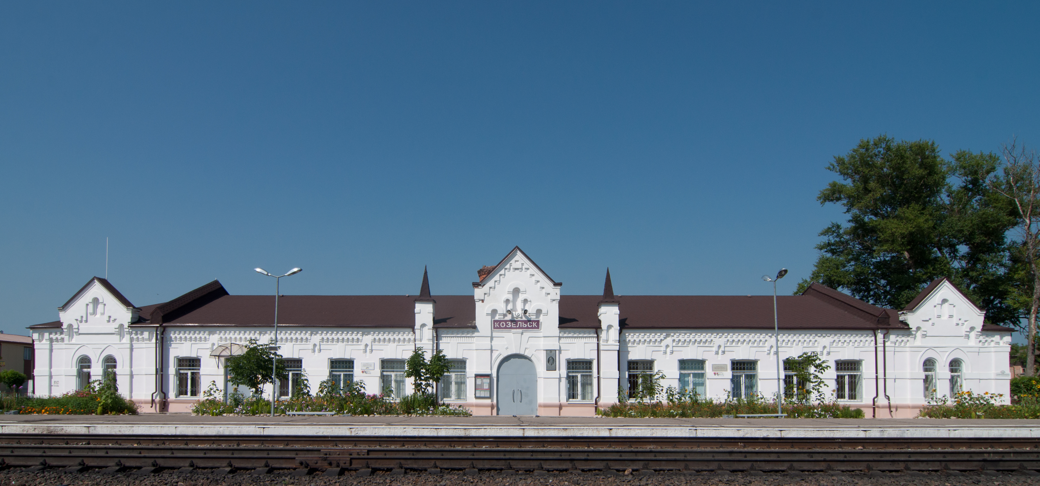 Здание вокзала: Чкалова, Козельск, Козельский район, Калужская область